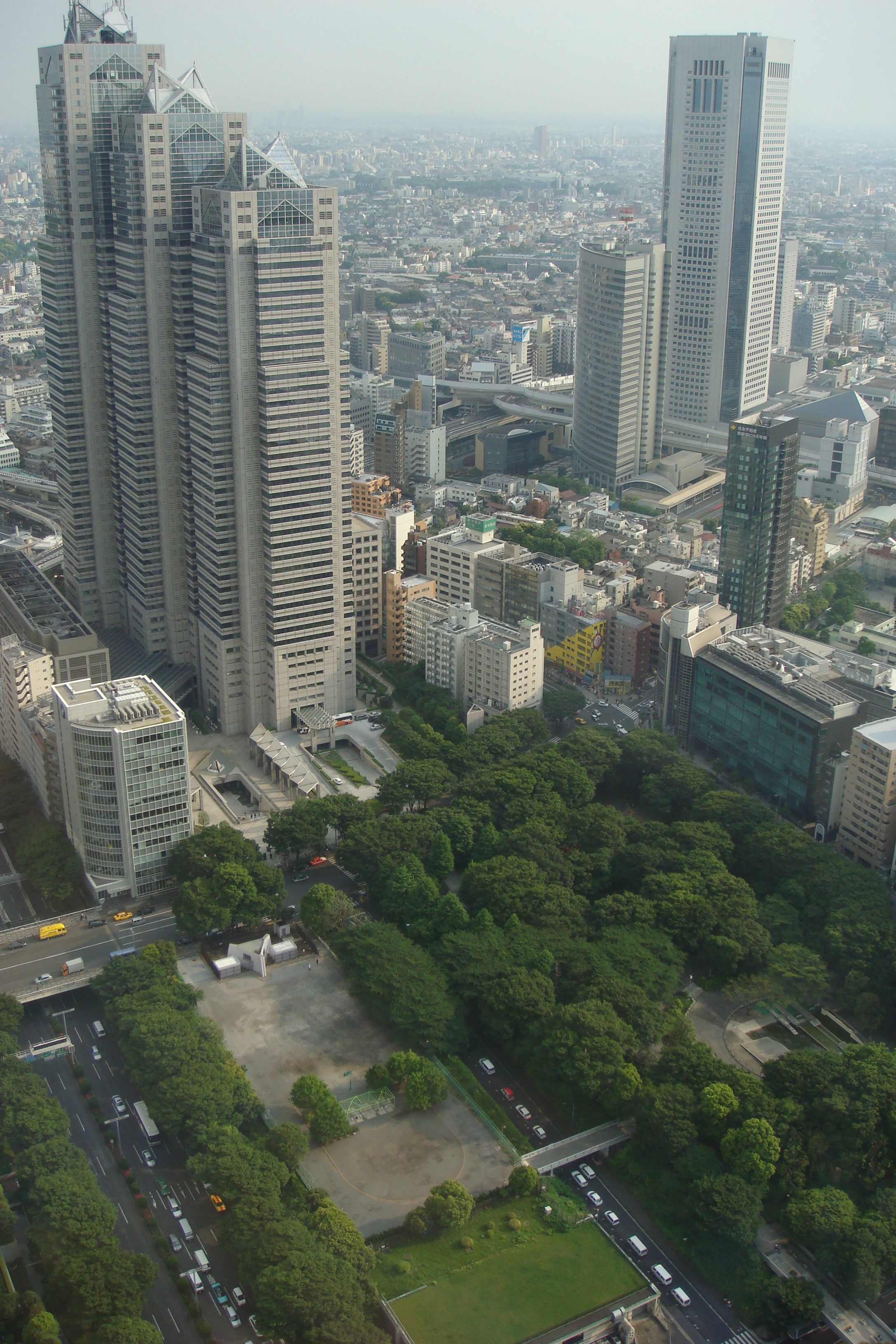 東京都庁第一本庁舎の北側展望室から見た新宿中央公園